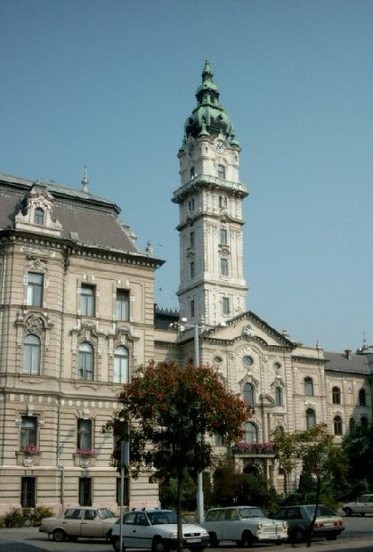 Urbodomo de Győr en Hungario.